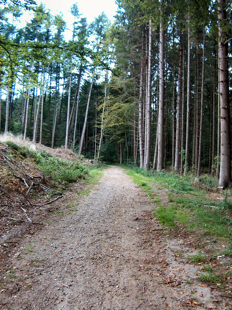 Naturstien Horsens-Silkeborg. Sti udenfor den oprindelige trace - som erstatning efter at anlæggelsen af motorvej E45 skar den gamle jernbanetrace (naturstien) over